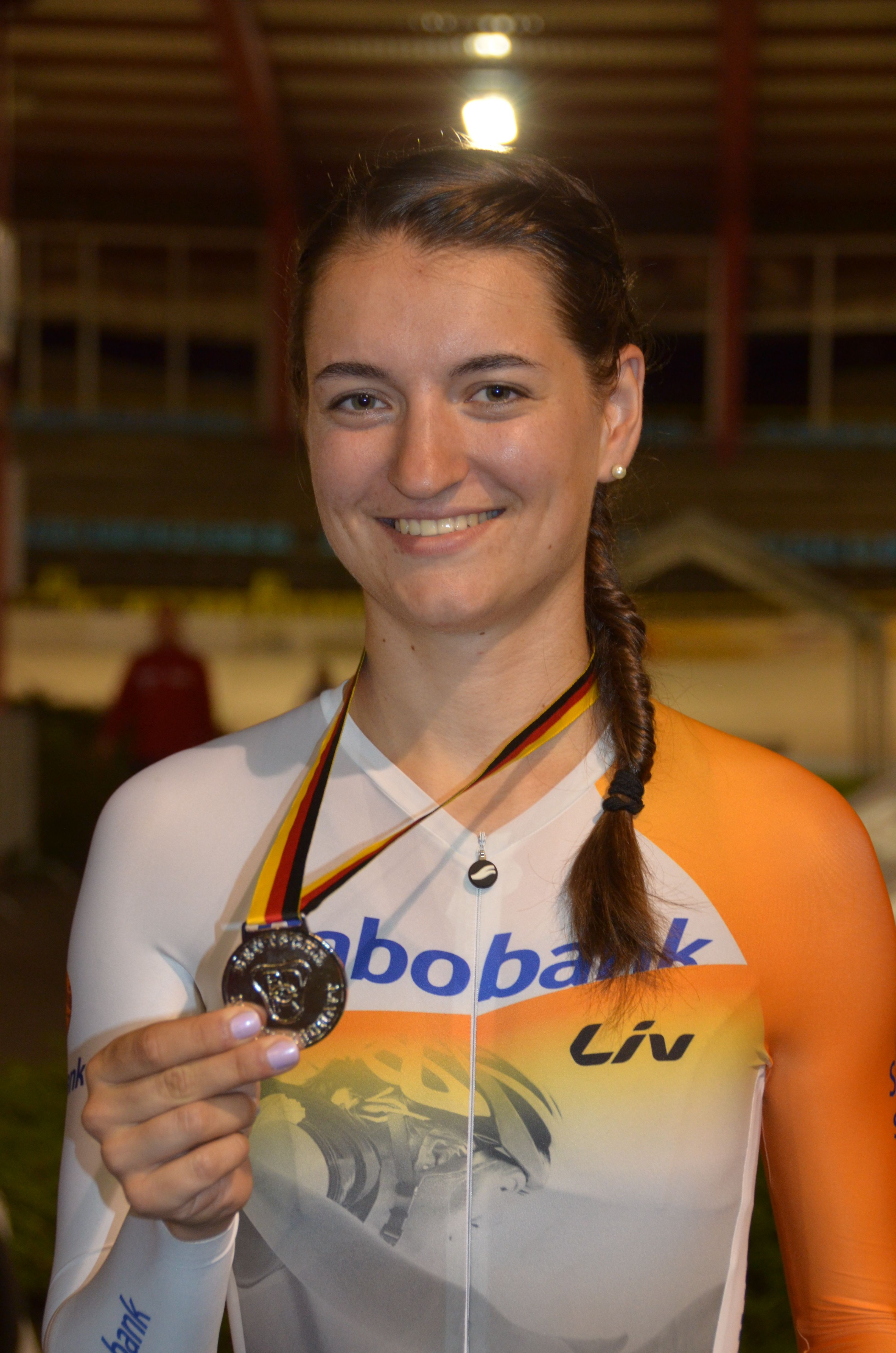 Anna Knauer, deutsche Radsportlerin The making of this document was supported by the Community-Budget of Wikimedia Germany.